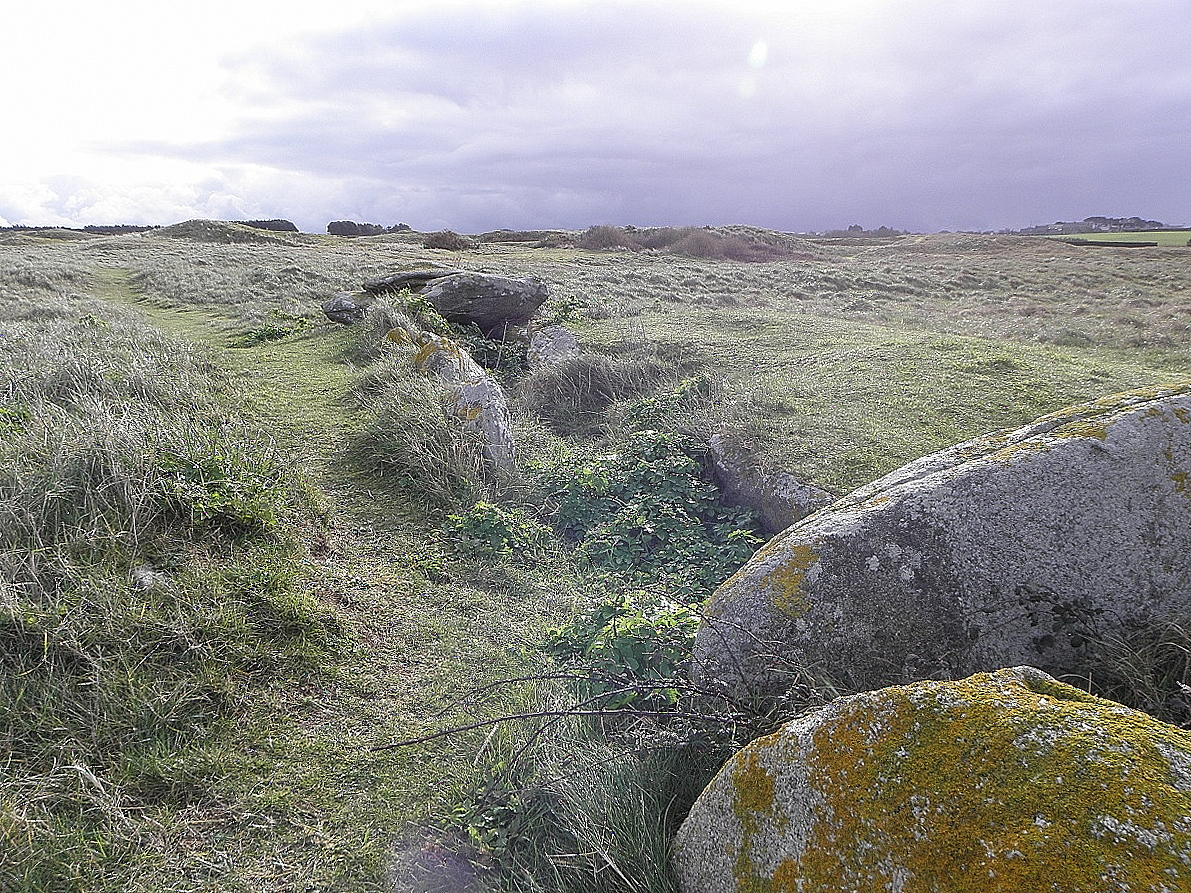 Allée couverte de Pont-ar-Bleiz en Lampaul-Ploudalmézeau (29).